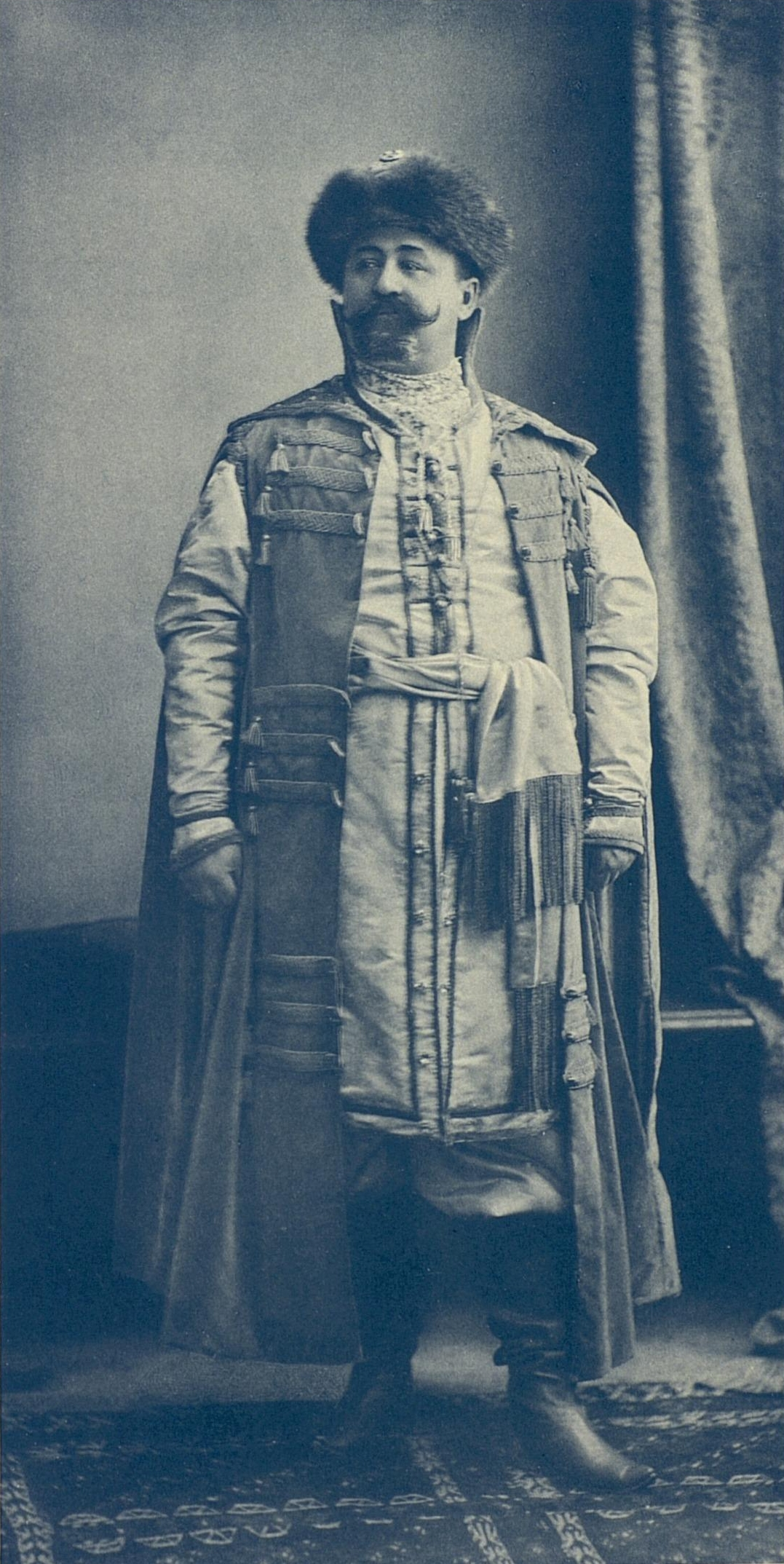 Шталмейстер Князь Иван Михайлович Оболенский в праздничном наряде боярина с Белгородской черты.